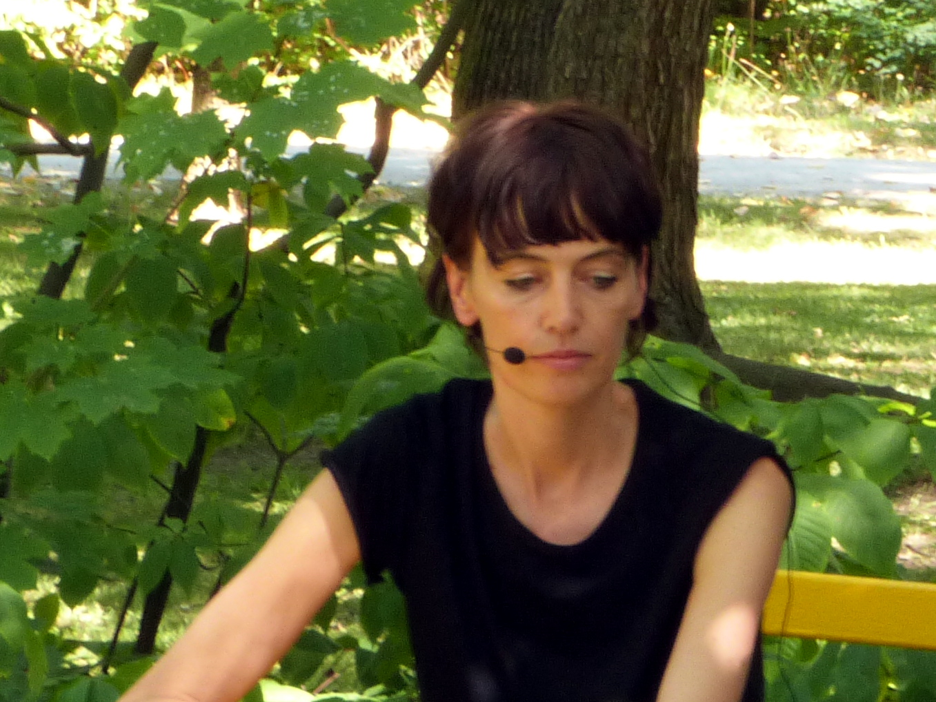 Schriftstellerin Anja Hilling während einer Lesung auf dem Erlanger Poetenfest 2016